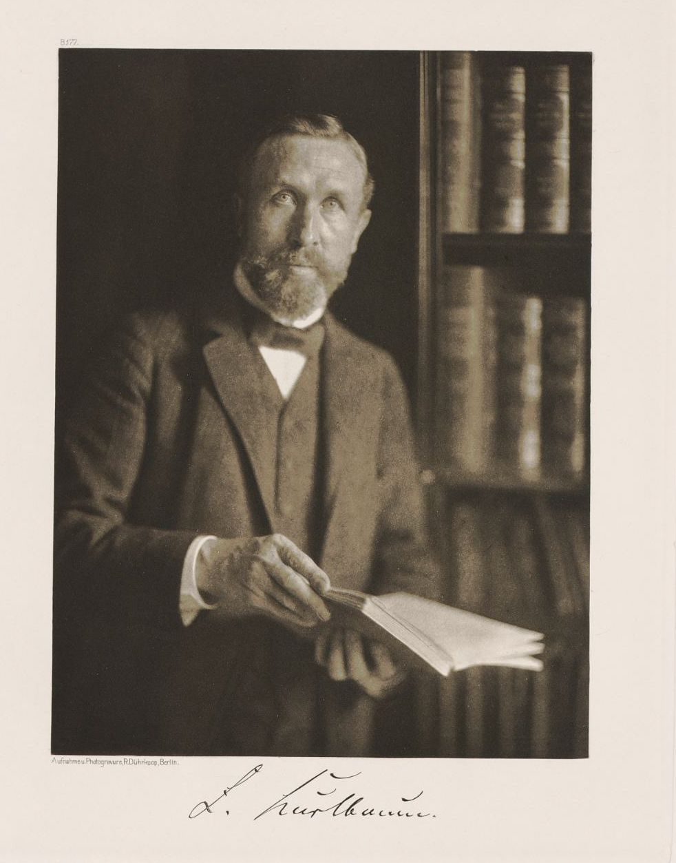 Ferdinand Kurbaum. Foto.